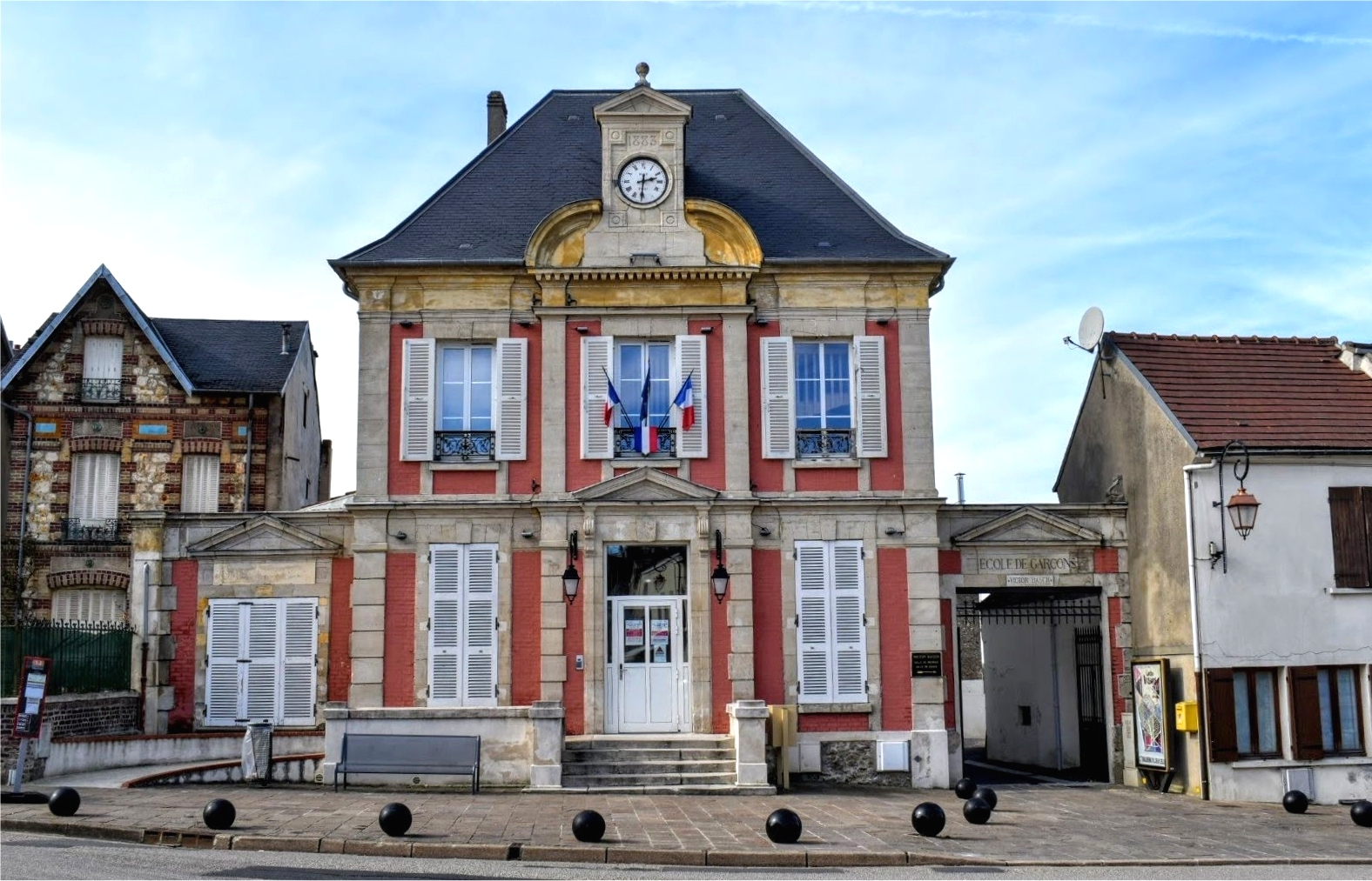 Ancienne mairie de Domont mise à jour 2018 suite au dernier aménagements .